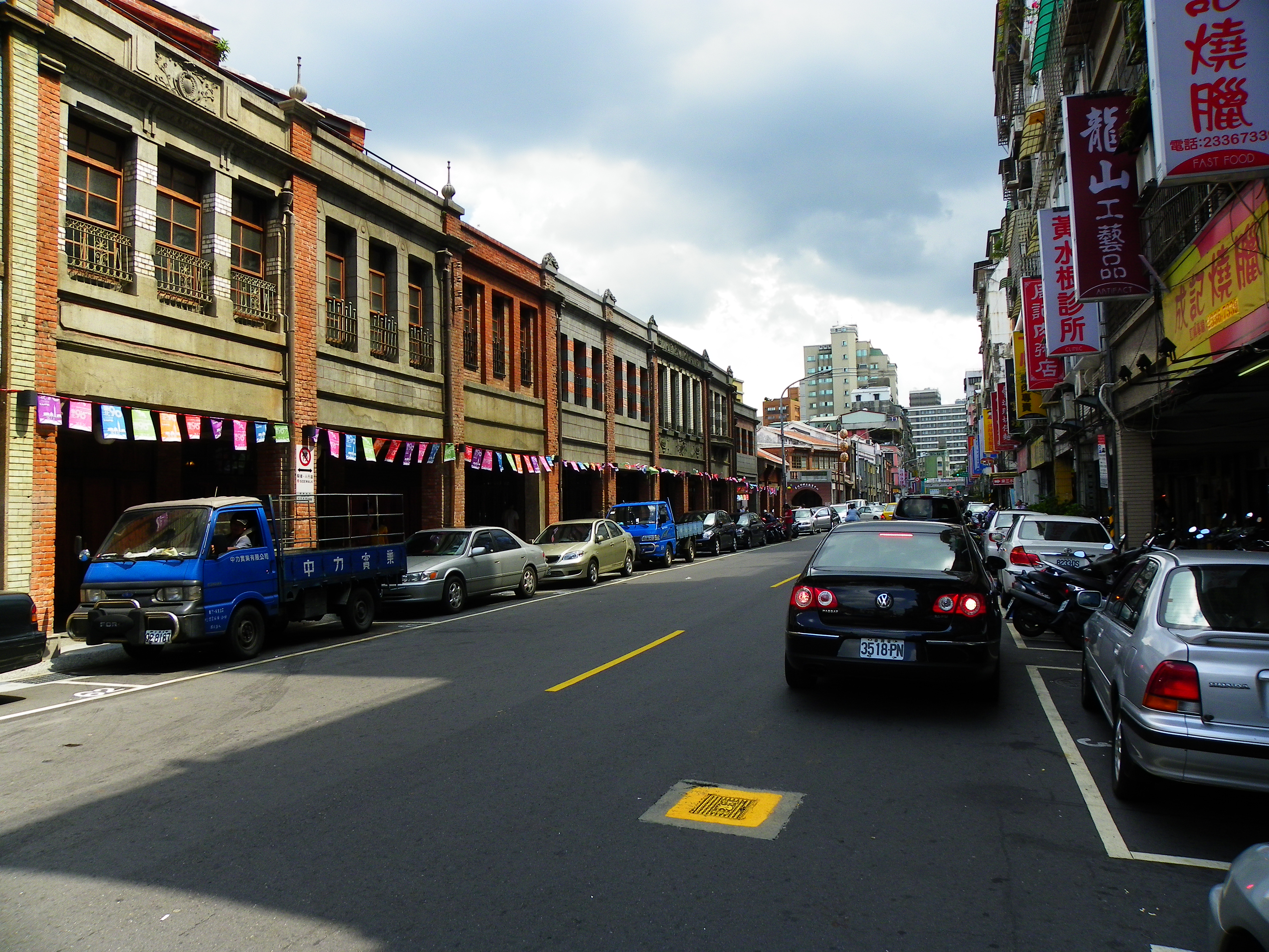 由西向東望臺北市萬華區廣州街中段，昆明街～康定路間，北方（左側）是剝皮寮。